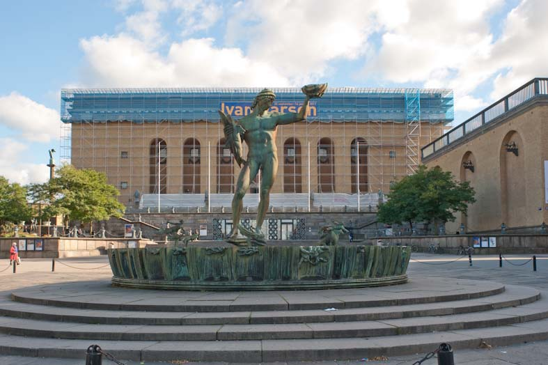 Konstmuseet och Konsthallen. Götaplatsen med Carl Milles staty Poseidon med brunnskar. Återfotografering av bild nr DB0194. Motiv: Göteborg Nyckelord: Riksintressen Kategori: Stadsmiljö, Museum Konstmuseet och Konsthallen. Götaplatsen med Carl Milles staty Poseidon med brunnskar. Återfotografering av bild nr DB0194.